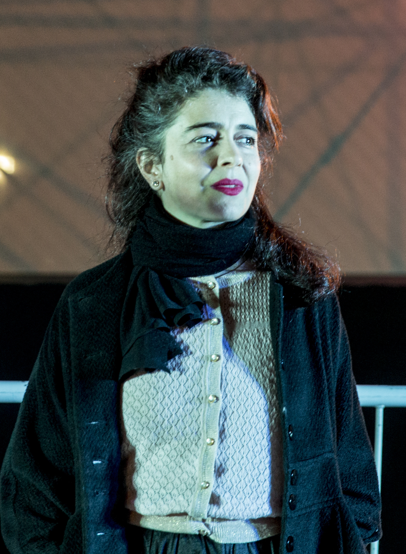 Mar del Palta, 18 de Noviembre de 2017.- Se proyectó la película "La Cordillera" como parte del ciclo de Proyecciones al Aire Libre de las películas nacionales más destacadas, en el Museo Mar Foto: Soledad Amarilla / Ministerio de Cultura de la Nación